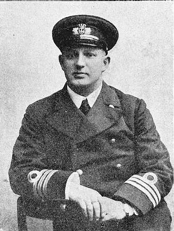 Portræt af søofficer og forfatter, Baron Cai Schaffalitzky de Muckadell, Orlogsmuseet, ca. 1920 .